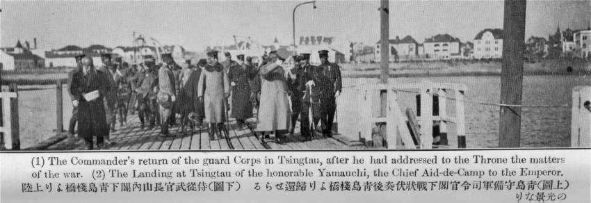 青岛占领军司令神尾光臣回国